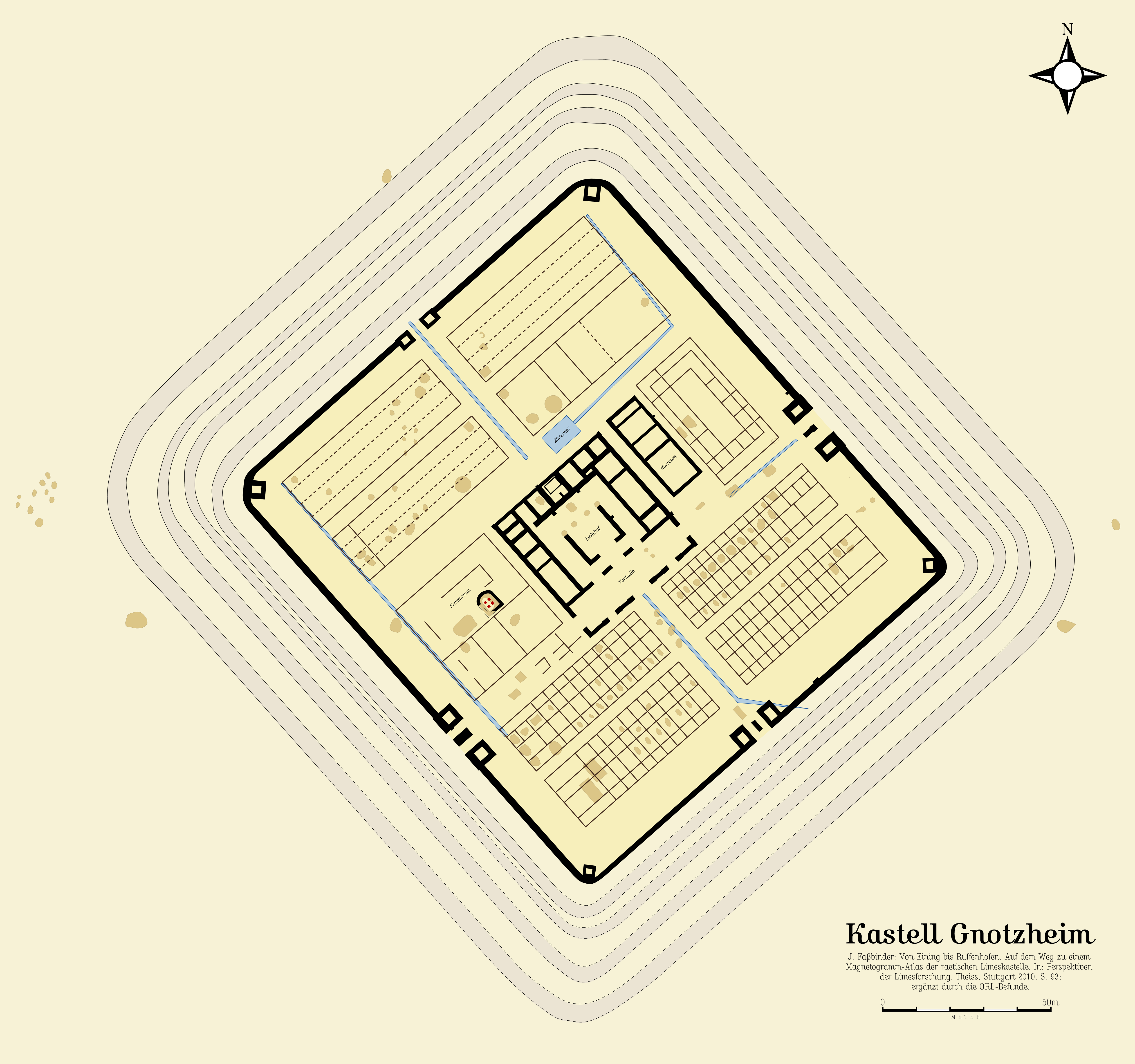 Das rätische Kastell Gnotzheim, Bayern, nach dem 2009 publizierten Plan der geophysikalischen Untersuchungen des Landesdenkmalamtes Bayern, Jörg Faßbinder. Die Quelle für die Darstellung befindet sich in der Datei selbst!